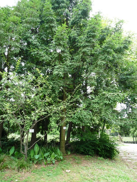 Nusseibe im Botanischen Garten, Shanghai